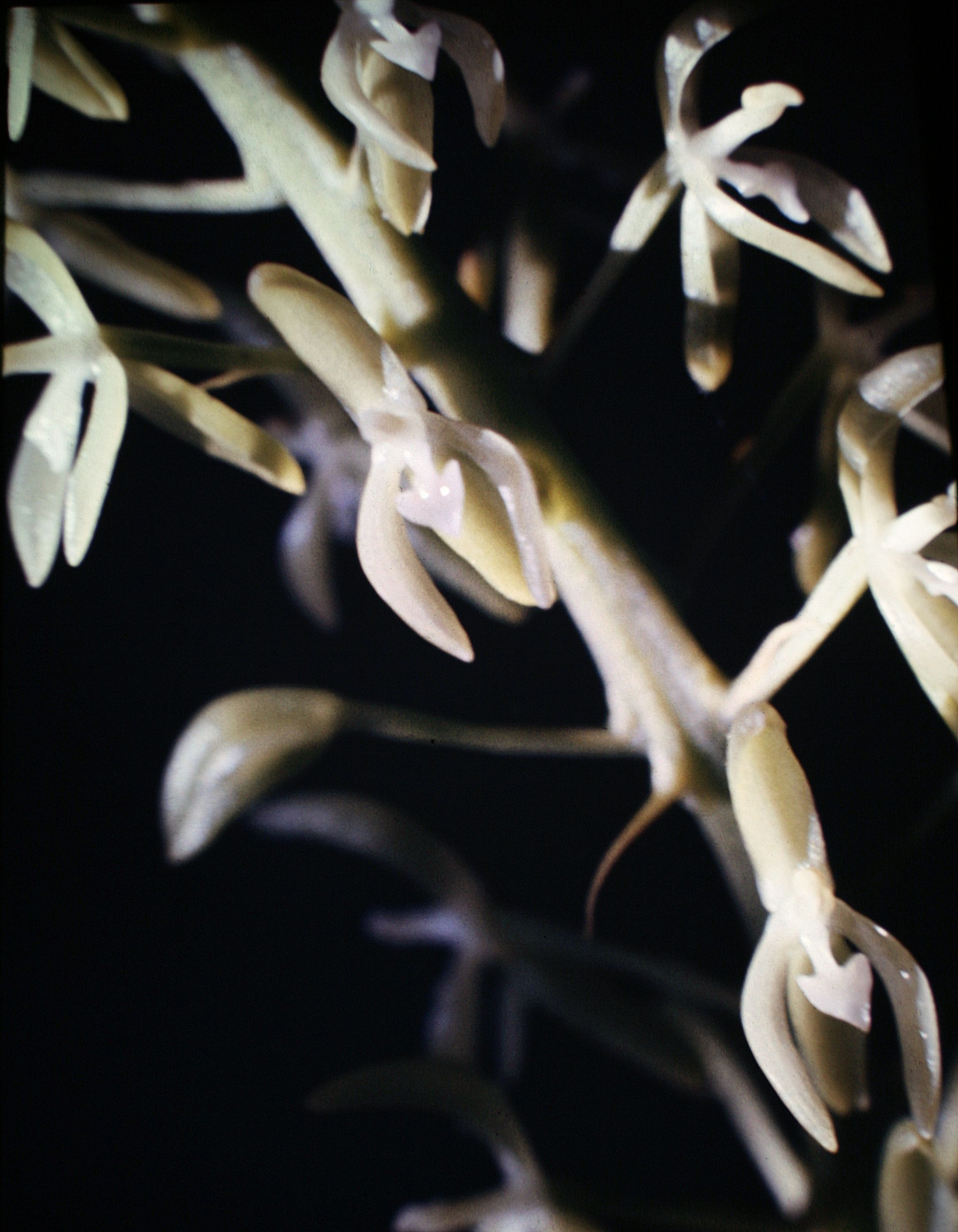 Notylia sagittifera. Suriname.